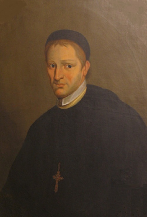 Geyer Dominicus (Dominik), 42 opat zakonu cystersów w Krzeszowie.